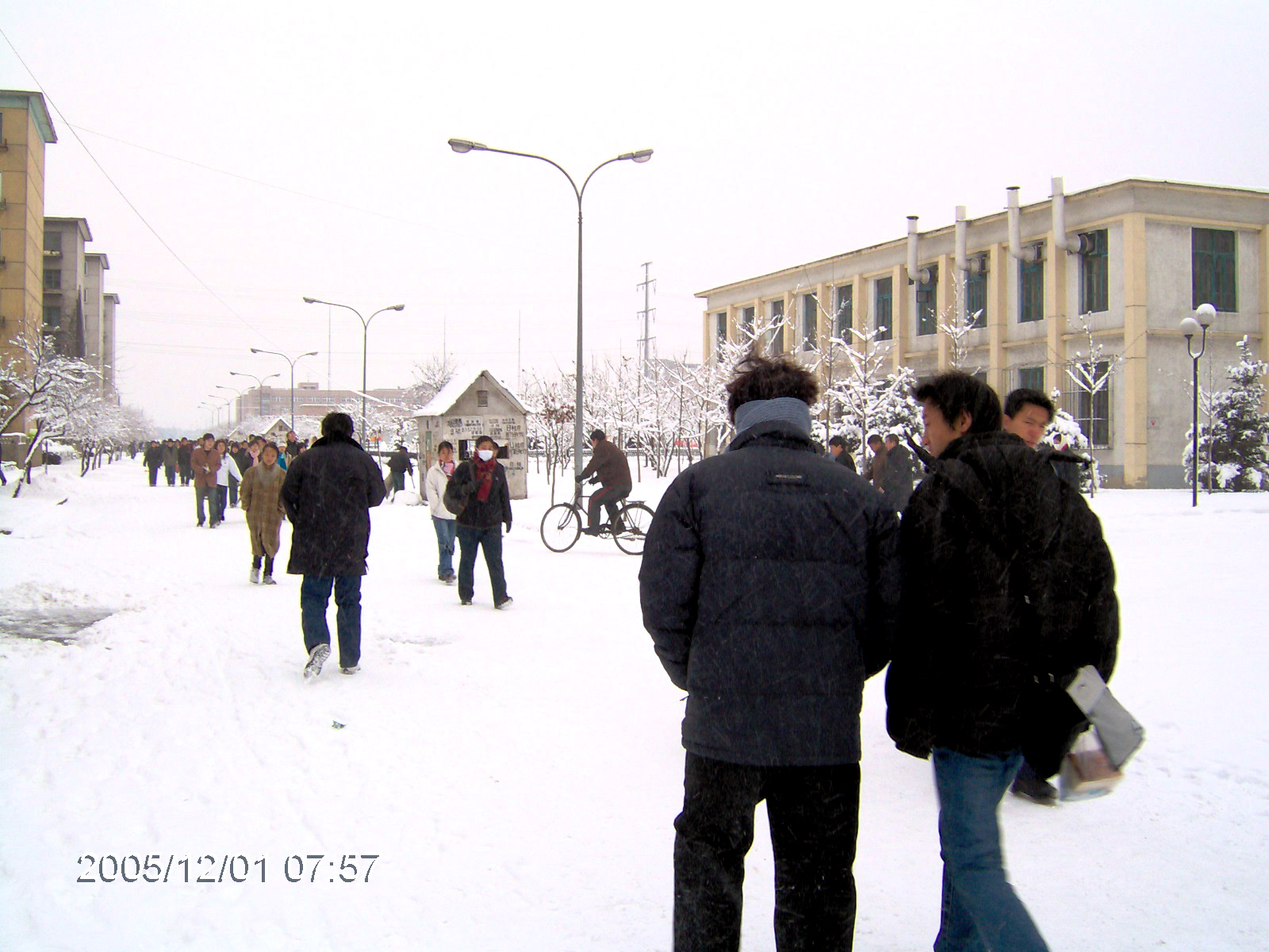 石油大学院内